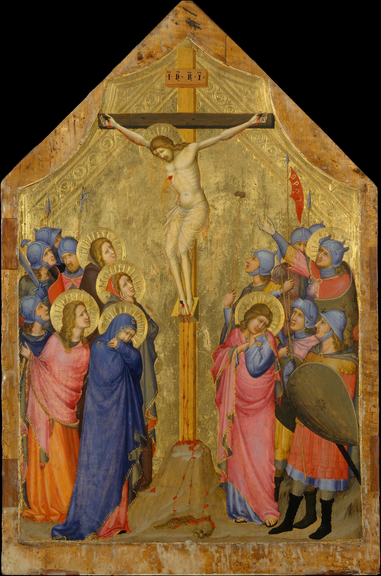 Italian; Painting; Paintings-Panels